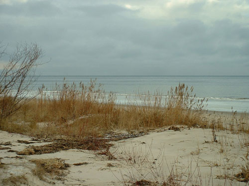 Strand von Jurmala, Lettland